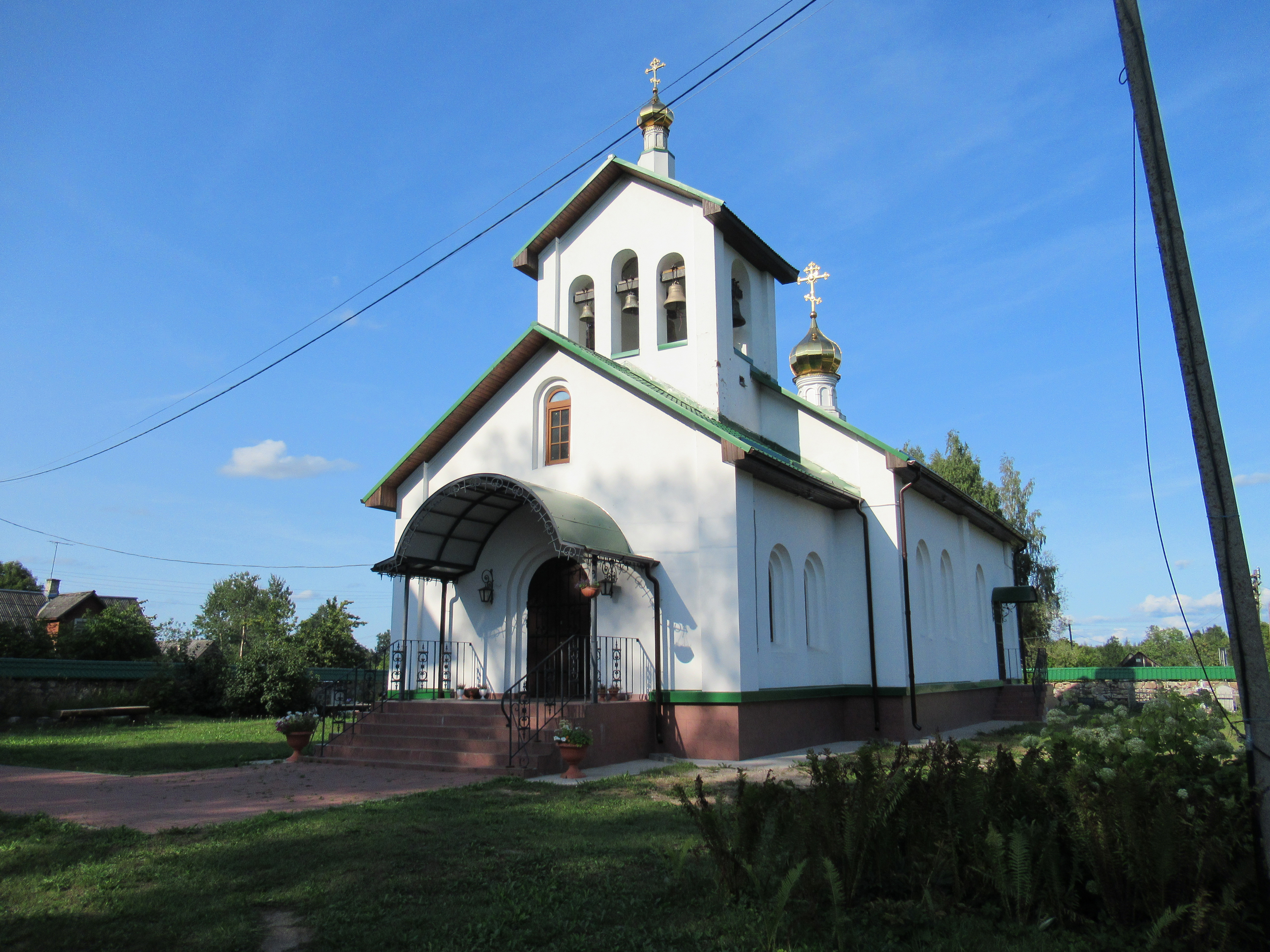 Pankjavitsa Nikolai Imetegija (uus) kirik